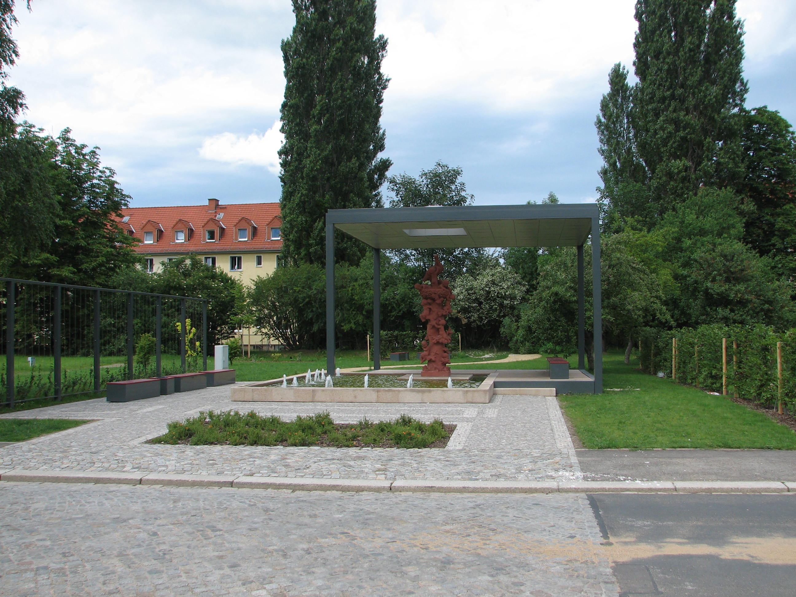 Der Storchenbrunnen mit kleiner Parkanlage in Freital-Döhlen.